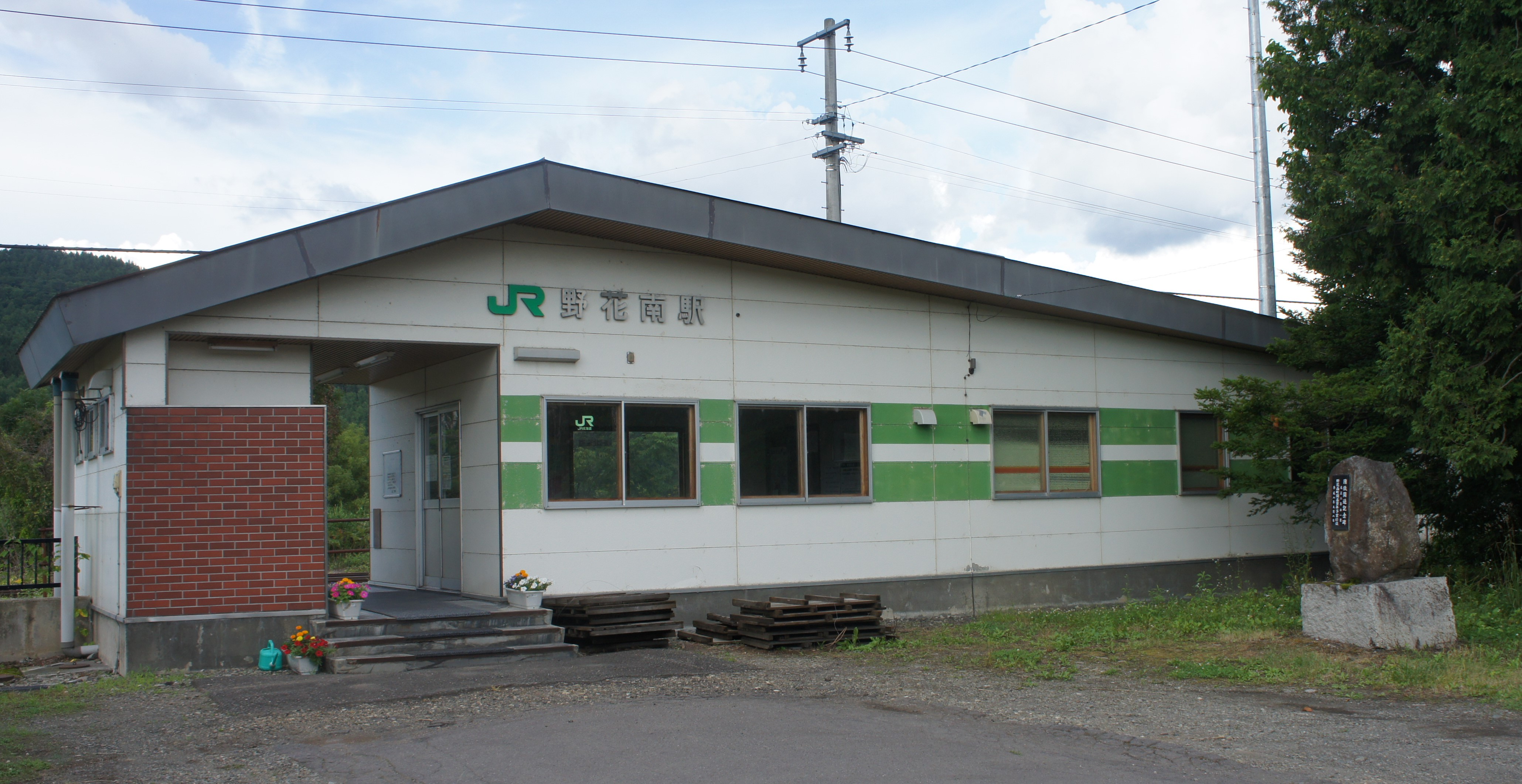 JR根室本線・野花南駅の駅舎